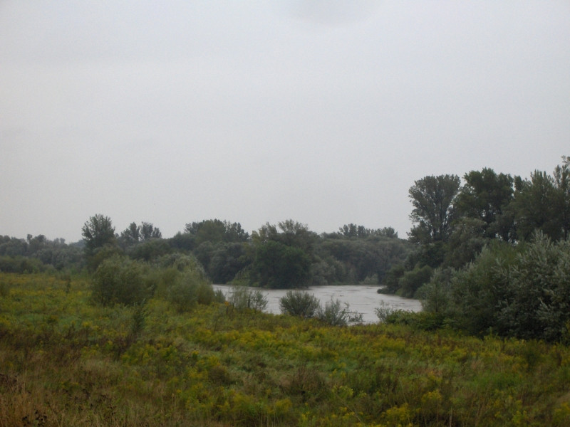 Górna Odra i Olza widziana z miejscowości Olza w powiecie wodzisławskim. Widok na trójstyk granic: powiatu wodzisławskiego (miejsce z którego robione jest zdjęcie), raciborskiego (drugi brzeg rzeki-wysokie drzewa po prawej stronie zdjęcia) oraz Republiki Czeskiej (tereny w klinie pomiędzy Olzą - z lewej strony zdjęcia a Odrą).